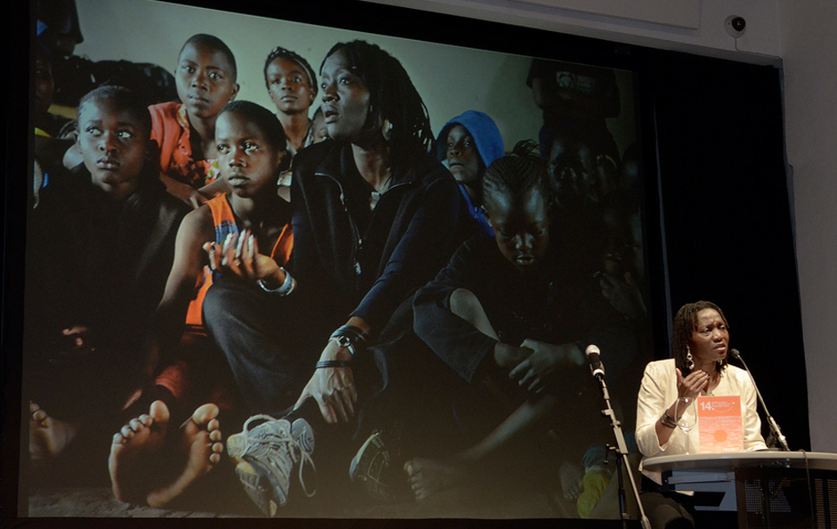 Auma Obama bei der GLOBART Academy 2011